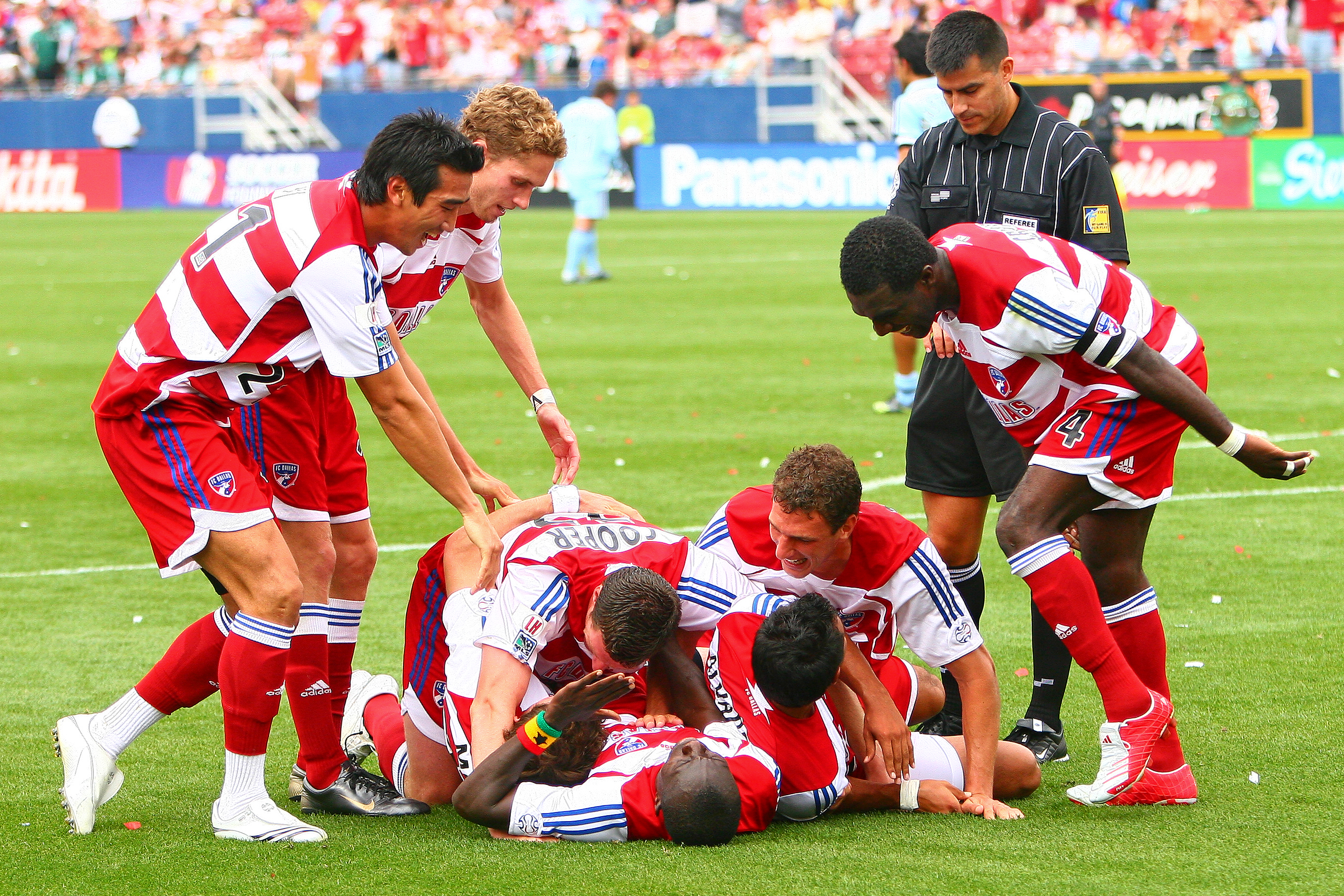 FC Dallas viert de goal (3-1) van Dominic Oduro in de 93e minuut van de wedstrijd FC Dallas-Colorado Rapids.